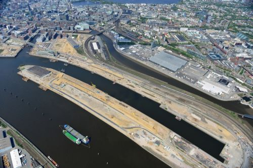 HAMBURG 15.05.2013 Blick auf die Baustelle des Stadtentwicklungsgebietes Baakenhafen an der Elbe in Hamburg. Seit Beschluss des Senats im Jahr 1998 sind das Hafenbecken und die umgebenden Landzungen formell Bestandteil des Projektes HafenCity, bei dem die Hafenflächen südlich der Hamburger Innenstadt aus ihrer ursprünglichen Nutzung entlassen und in Einzelhandels-, Gewerbe-, Wohn- und freizeitbezogene Flächen umgewandelt werden sollen. Den städtebaulichen Wettbewerb für das Baakenhafen-Quartier hatte im August 2011 das Büro APB Architekten für sich entscheiden. // View of the construction site of the city development area Baakenhafen on the Elbe in Hamburg. Since the resolution of the Senate in 1998, the harbor and the surrounding headlands are formally part of the project HafenCity, where the port areas released south of the city center of Hamburg from its original use and to be converted to retail, commercial, residential and leisure-related areas. /